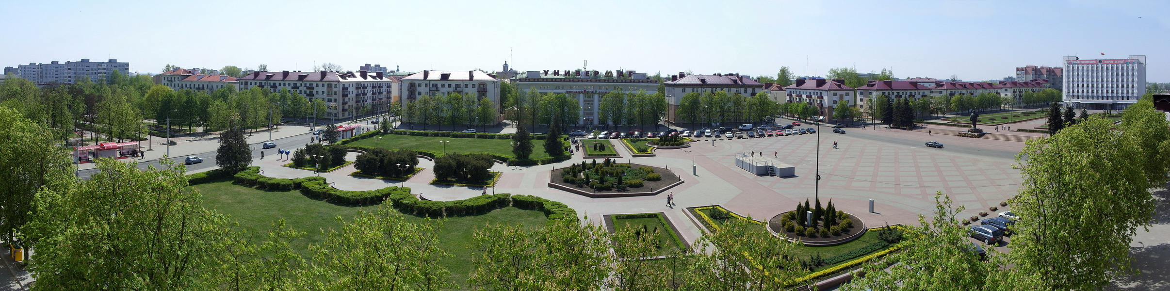 Площадь им. Ленина, г. Бобруйск